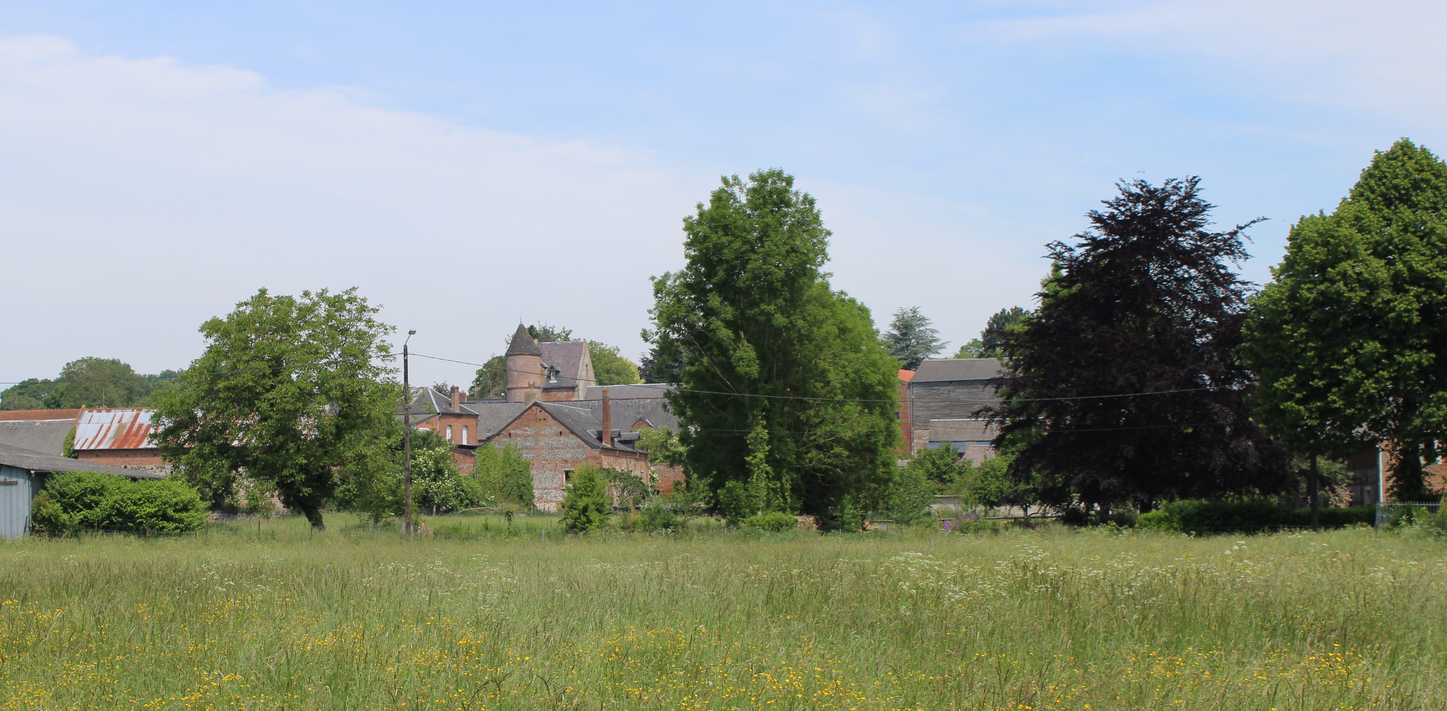 Panorama du village depuis les rives de l'Oise